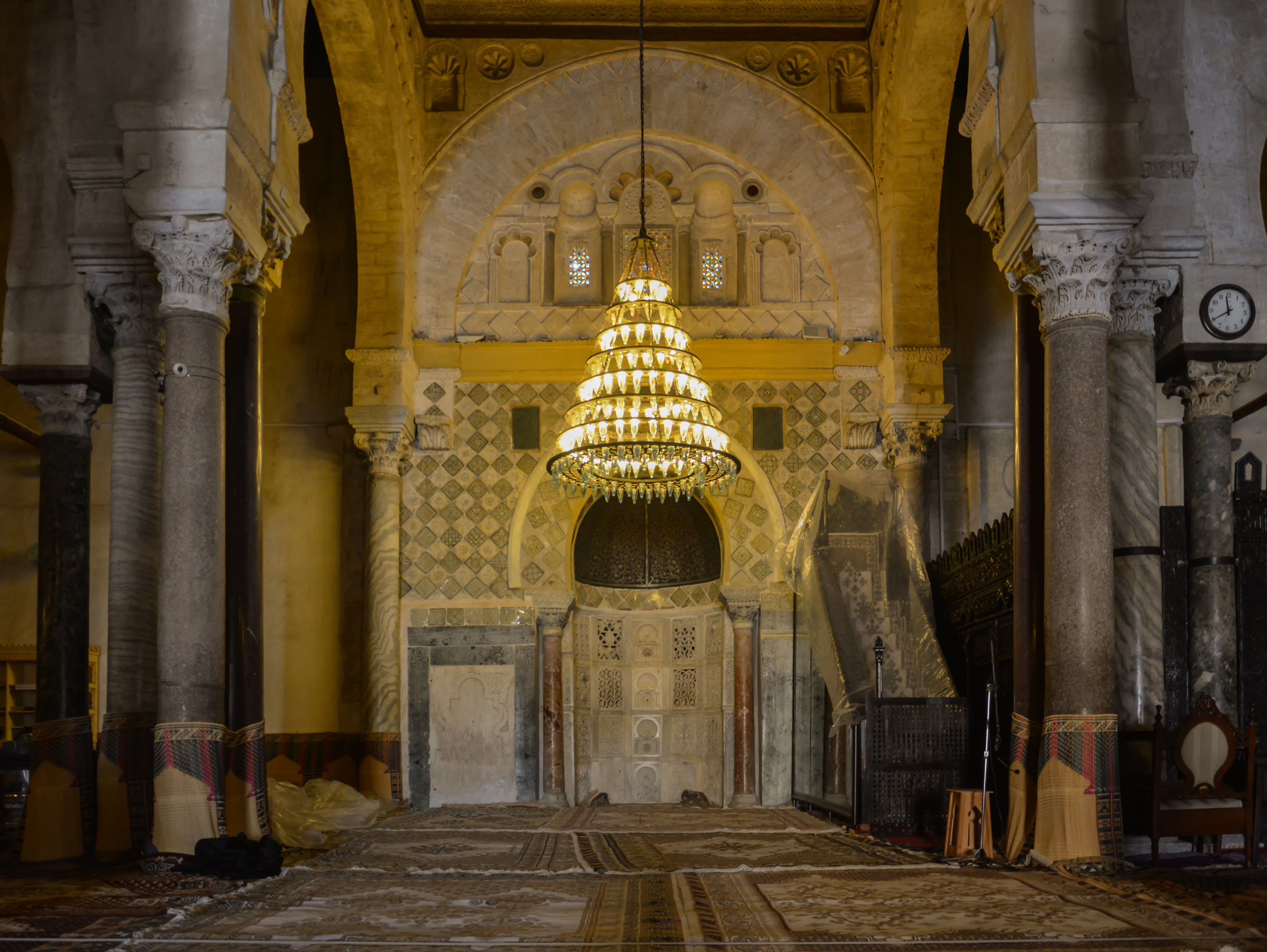 Grande Mosquée (Sidi Okba), détails du mihrab